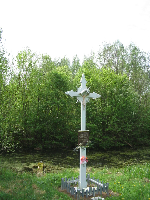 Nikelų kryžius